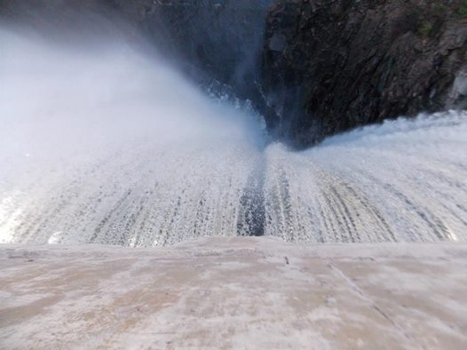 Murallón que permite a las personas ver el Dique de Olta